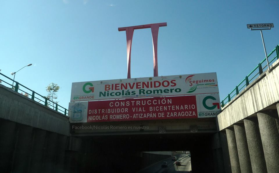 Letrero de entrada al municipio. Entrada por Atizapán de Zaragoza